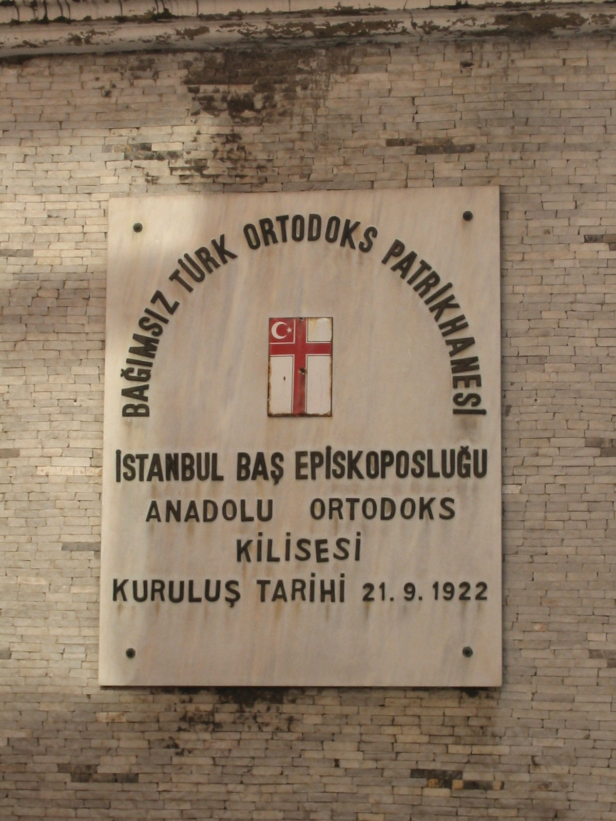 Santa María de Kaffa (Panagia Kaphatiani), Patriarcado Ortodoxo Turco